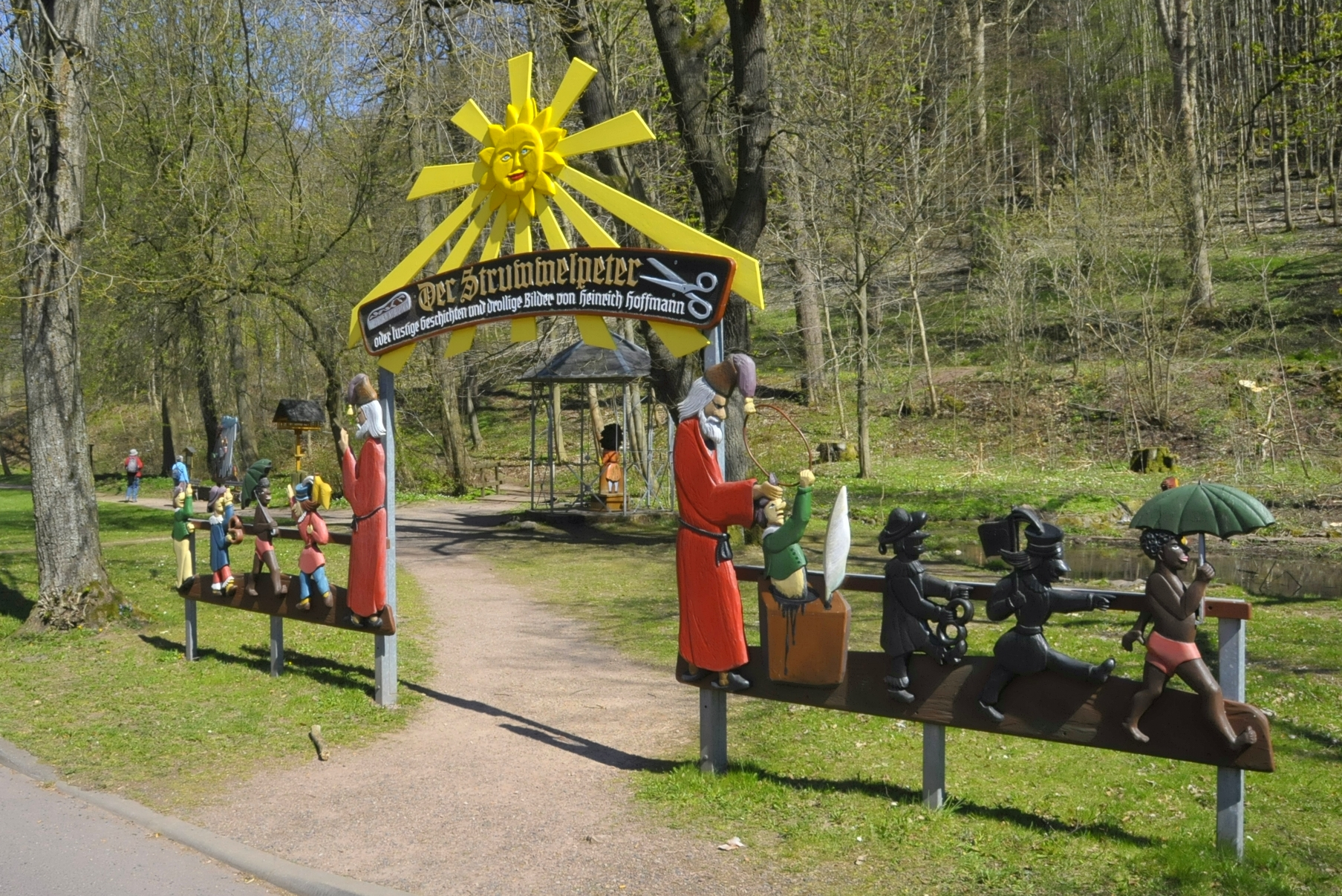 Tabarz, Eingangsportal zur Struwwelpeter-Welt